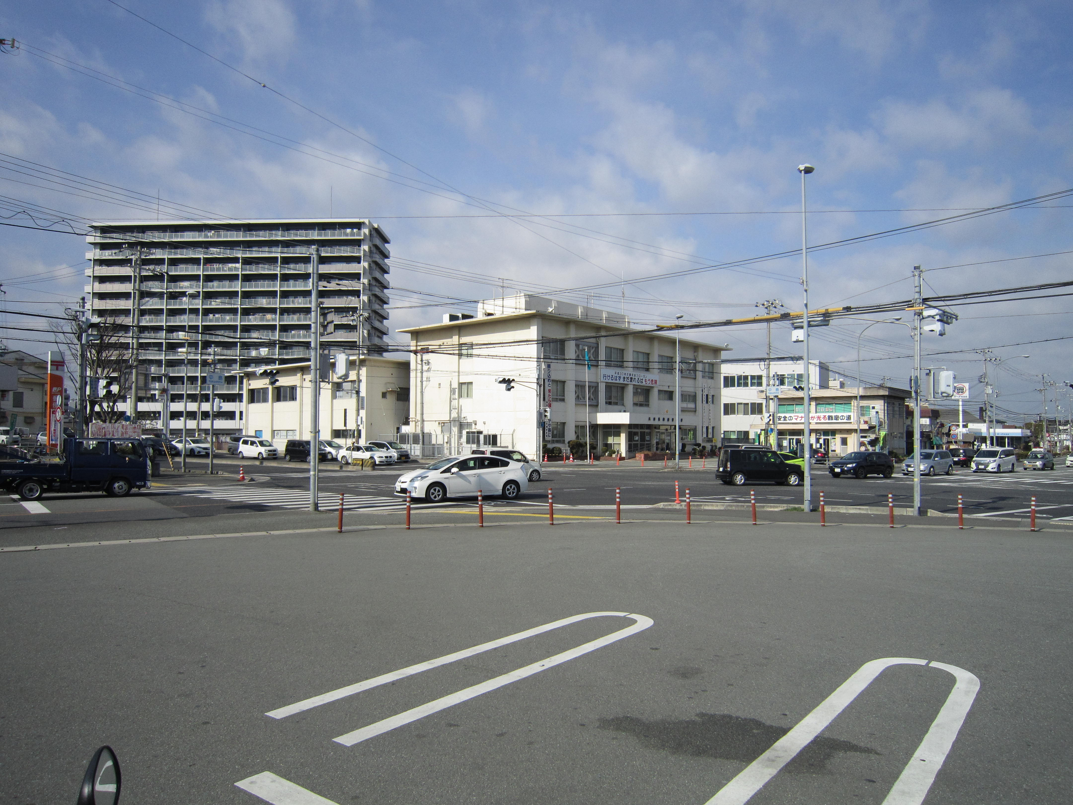 姫路市飾磨区にある姫路飾磨警察署。